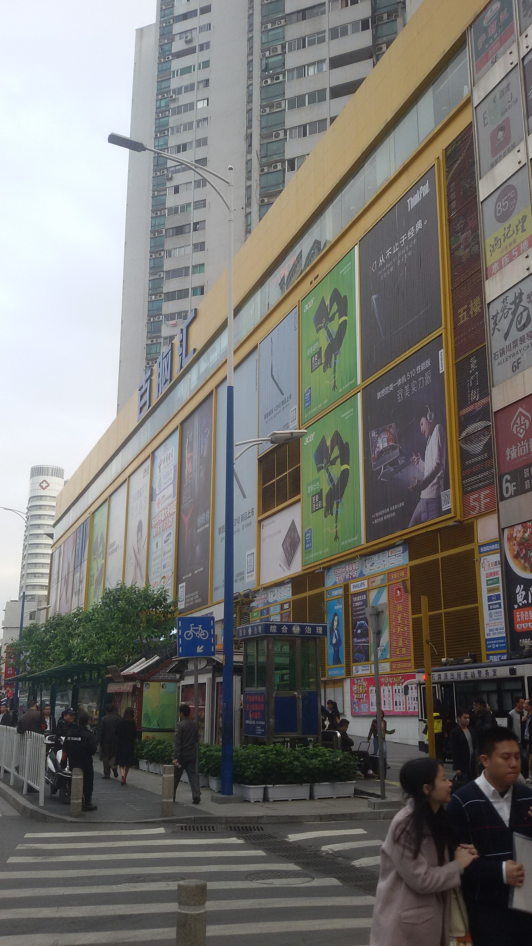 粵語: 百脑汇广州分店